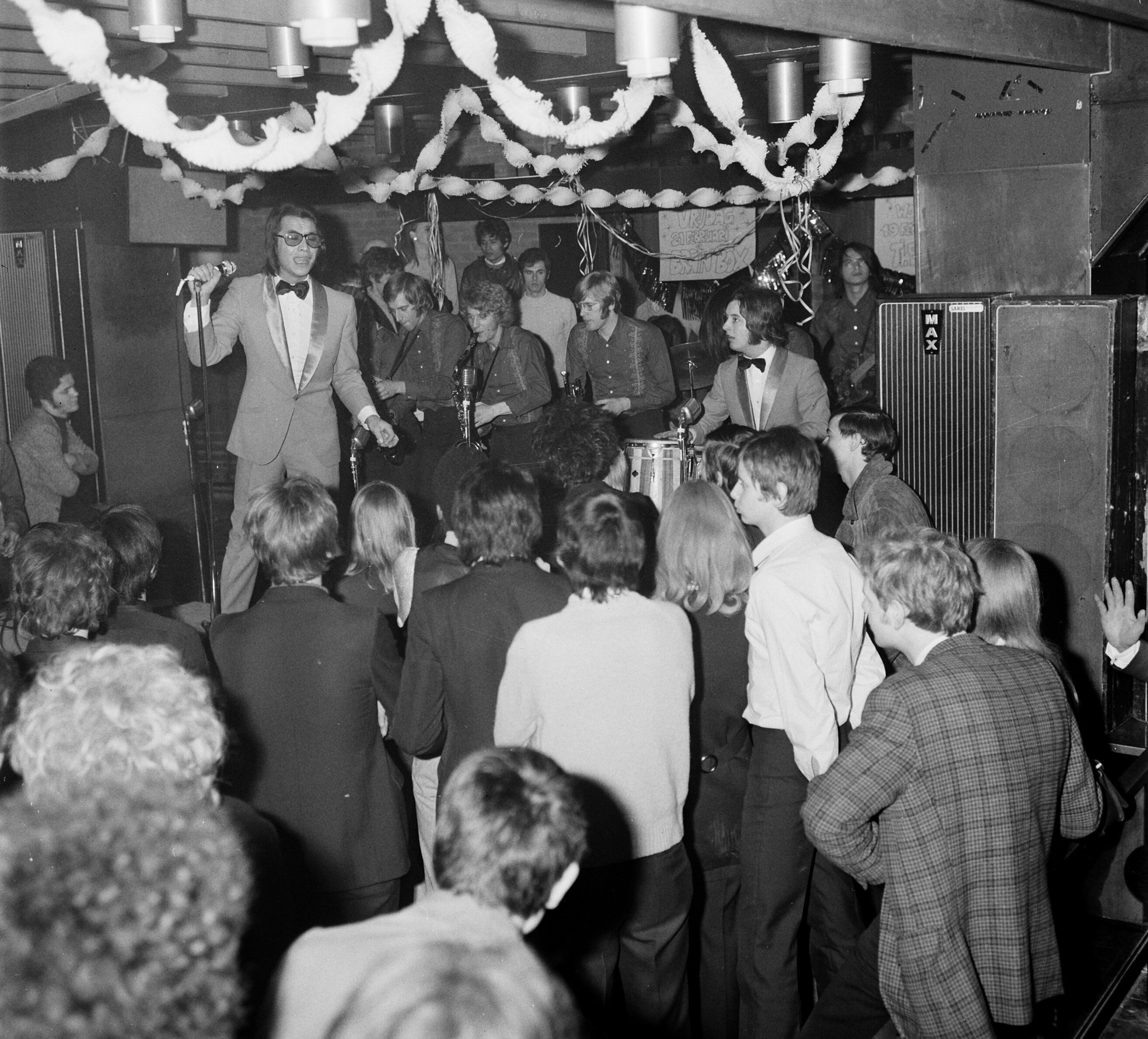 Collectie / Archief : Fotocollectie Anefo Reportage / Serie : [ onbekend ] Beschrijving : Soulgroep " The Free " geeft show in Amsterdamse Club 67 Jimmy Mach van The Free Datum : 19 februari 1969 Trefwoorden : Soulgroepen, shows Persoonsnaam : Club 67, Jimmy Mach Instellingsnaam : Free, The Fotograaf : Mieremet, Rob / Anefo Auteursrechthebbende : Nationaal Archief Materiaalsoort : Negatief (zwart/wit) Nummer archiefinventaris : bekijk toegang 2.24.01.03 Bestanddeelnummer : 922-1200